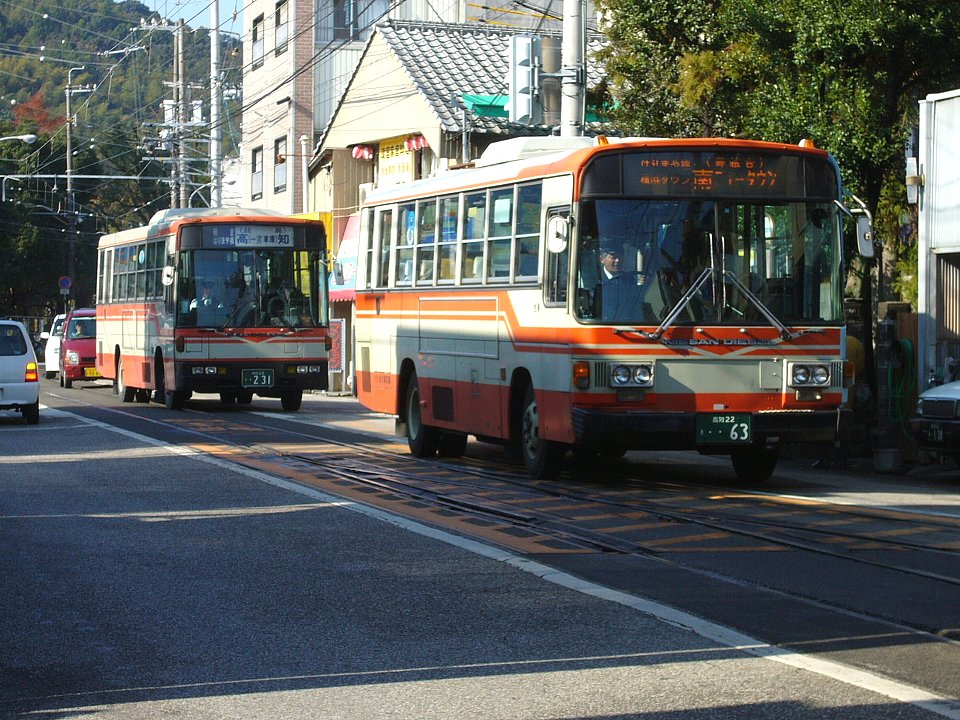 朝倉電停付近を続行するja:高知県交通バス